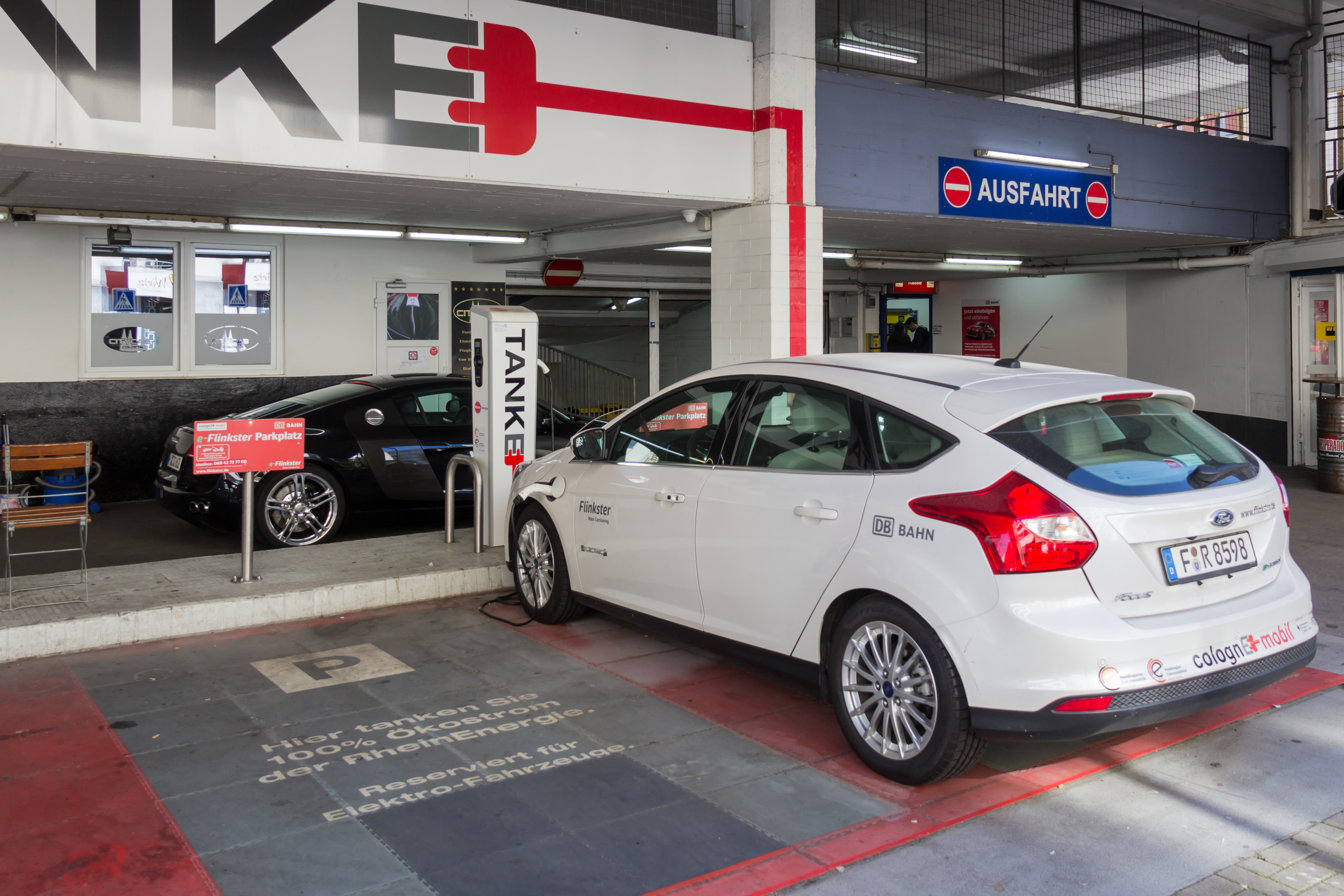 Stromtankstelle Tanke Rheinenergie mit Flinkster-Autos am Parkhaus Lungengasse, Köln